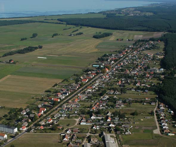 Leopoldshagen aus der Vogelperspektive